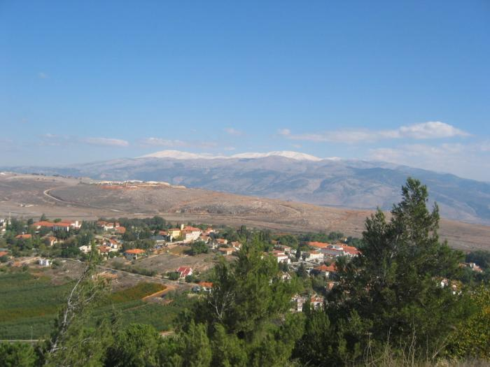 מראה מטולה והר חרמון